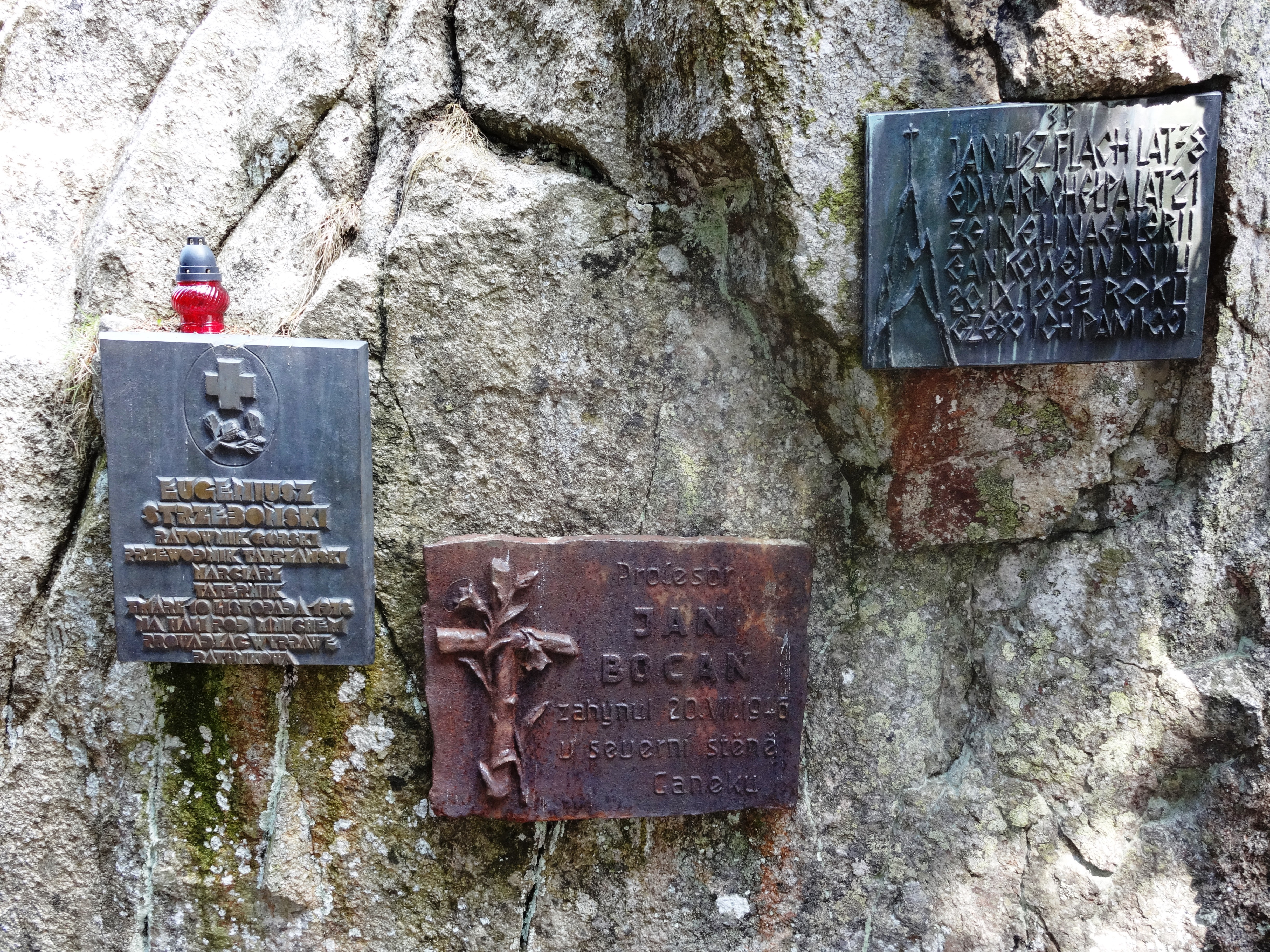 Tatrzański Cmentarz Symboliczny